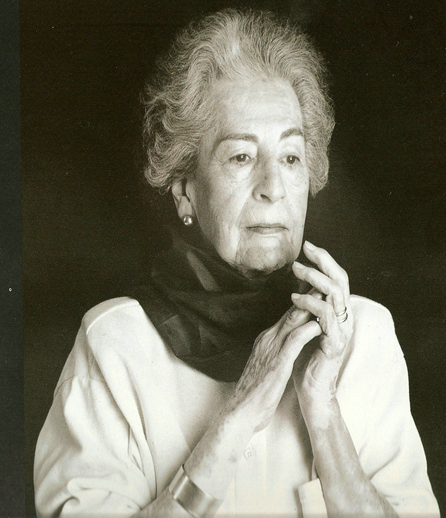 Fotografía de Emilia